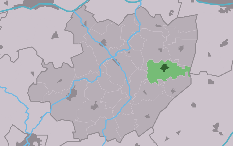 Kaartsje fan himrik fan Mantgum